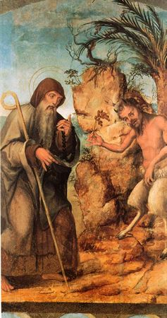 "Santo Antão e o Sátiro" forma, juntamente com a "Pregação de São João Baptista", "Santo Antão e São Paulo Eremita", "São Jerónimo" e "Visão de Santo Antão", um conjunto designado por "série dos arcos" devido à arcaria que se rasga sobre um fundo azul e que corre a parte inferior de todas as tábuas. O "Retábulo do Mestre dos Arcos", nome pelo qual também é conhecido, não foi ainda objecto de um estudo aprofundado, com a excepção da contribuição de Luís Reis-Santos que atribuíu a autoria dos quadros a Gregório Lopes, o que, contudo, não deixa de levantar alguns problemas, uma vez que estas pinturas não se enquadram plenamente no estilo do pintor. Este quadro, tal como os restantes quatro painéis que compunham o conjunto da "série dos arcos", provêm do convento de São Bento da Saúde, embora tudo indique que não seriam originários desta instituição beneditina, uma vez que apenas foi construída em 1598, ou seja, numa data posterior à feitura dos quadros.